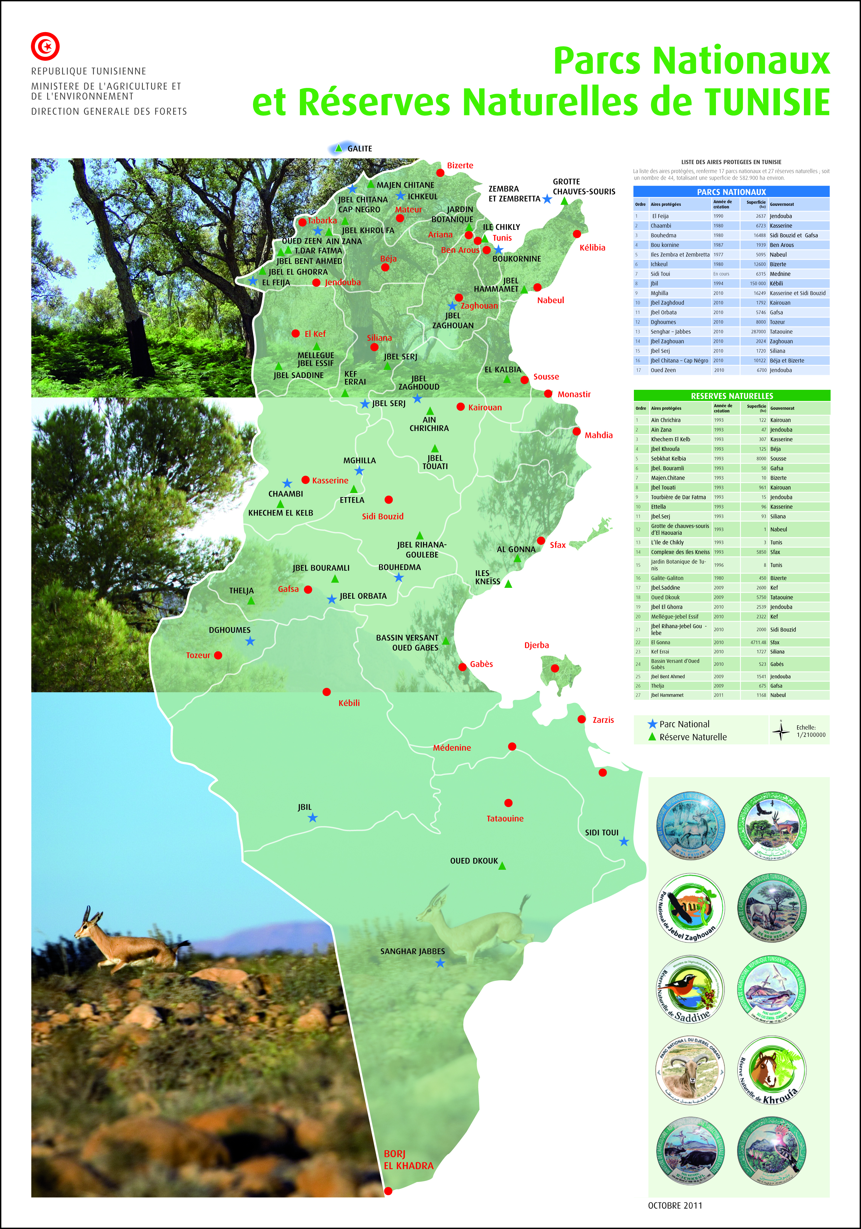 Liste des parcs nationaux et réserves naturelles en Tunisie en 2011. Direction générale des forêts, Ministère de l'environnement et de l'agriculture (Tunisie).